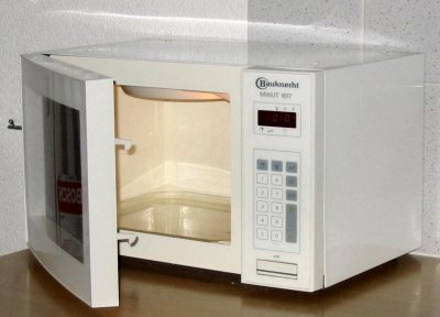 Magnetron, gefabriceerd ca. 1988, eigen foto (je moet iets als Wikipedia met kerst plat ligt....)